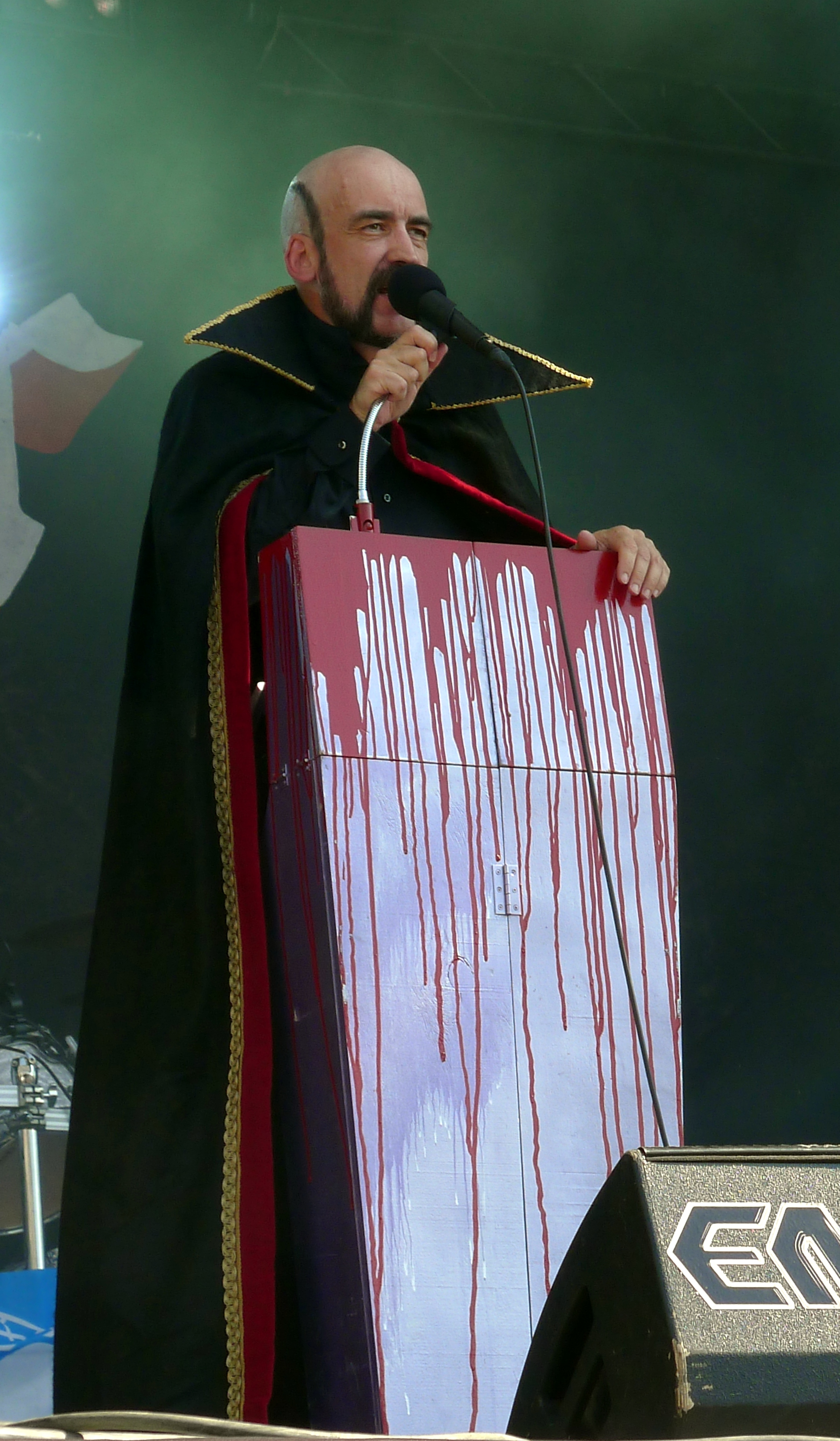 Bulldozer live am Tuska Open Air 2011